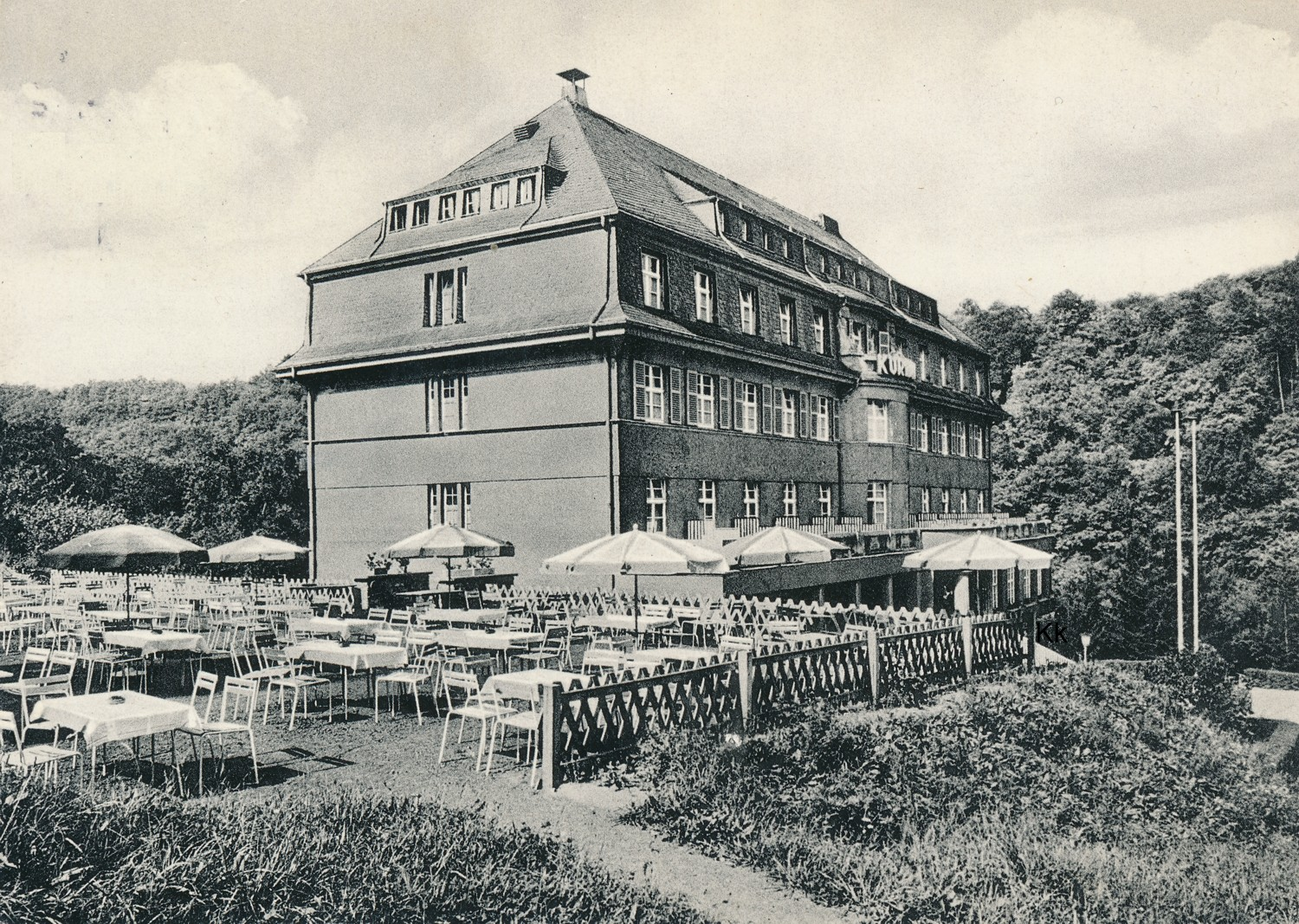 Kurhaus Stromberg 1961 Kaffeeterassen im südlichen Bereich